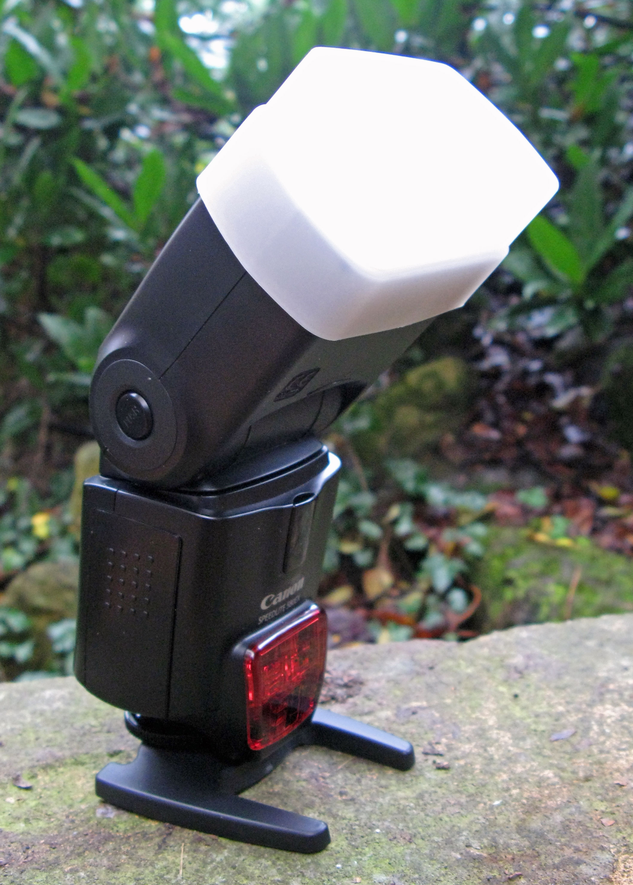 Sto-Fen Bouncer.